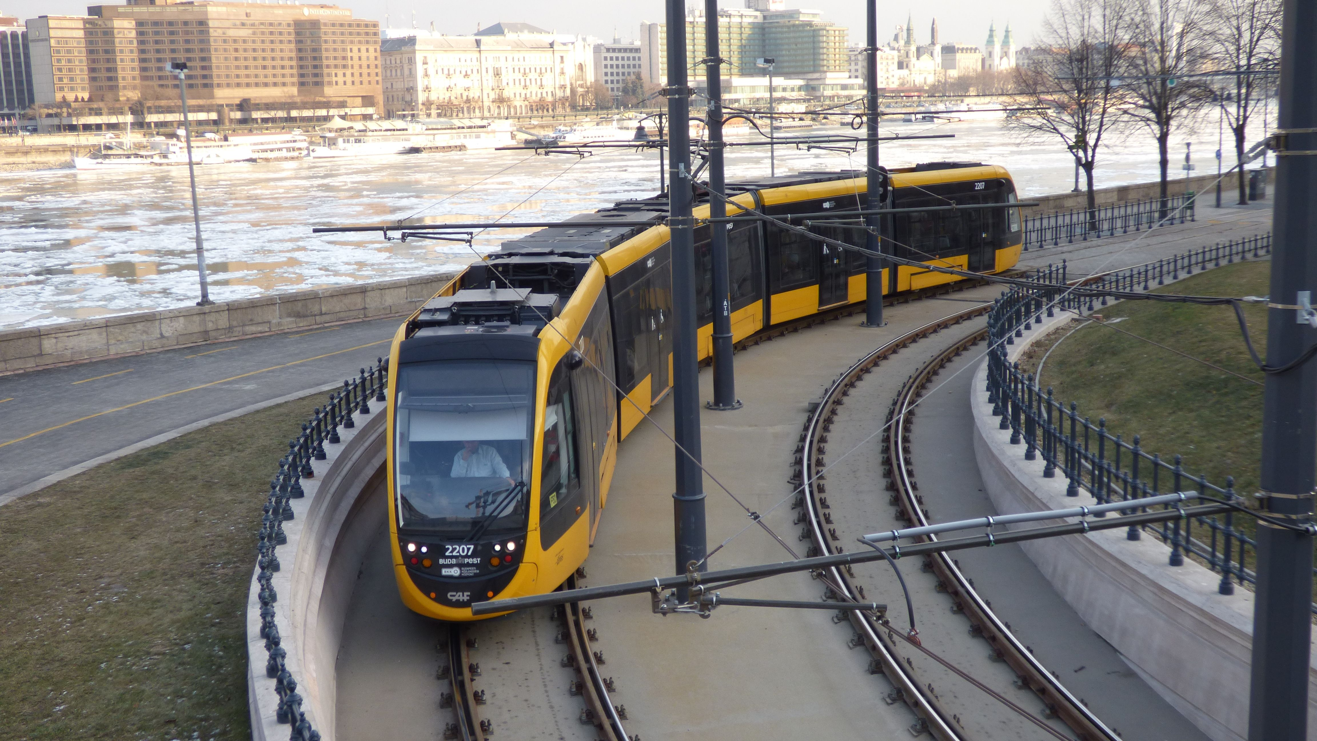 CAF Urbos 3 villamos a Clark Ádám térnél jelzés nélkül a 19-es vonalon (psz. 2207)